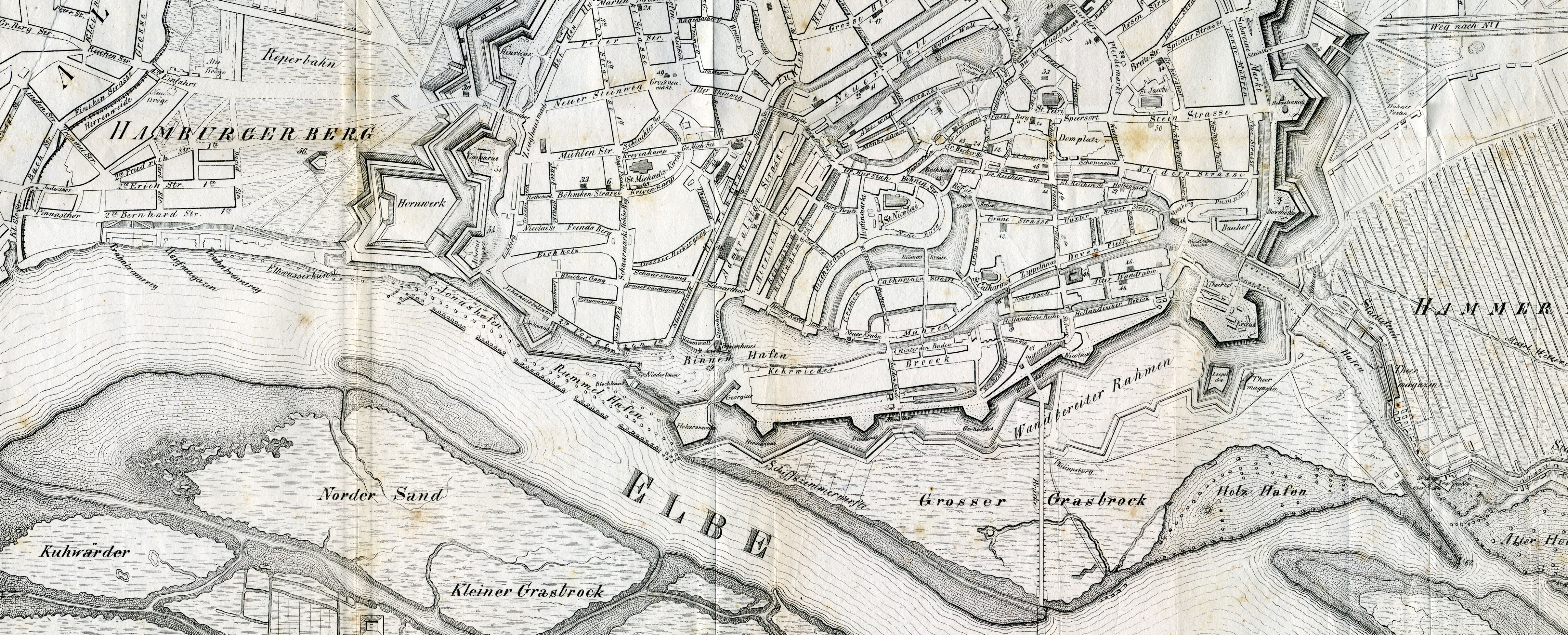 Hafen und Elbe bei Hamburg 1813/1814